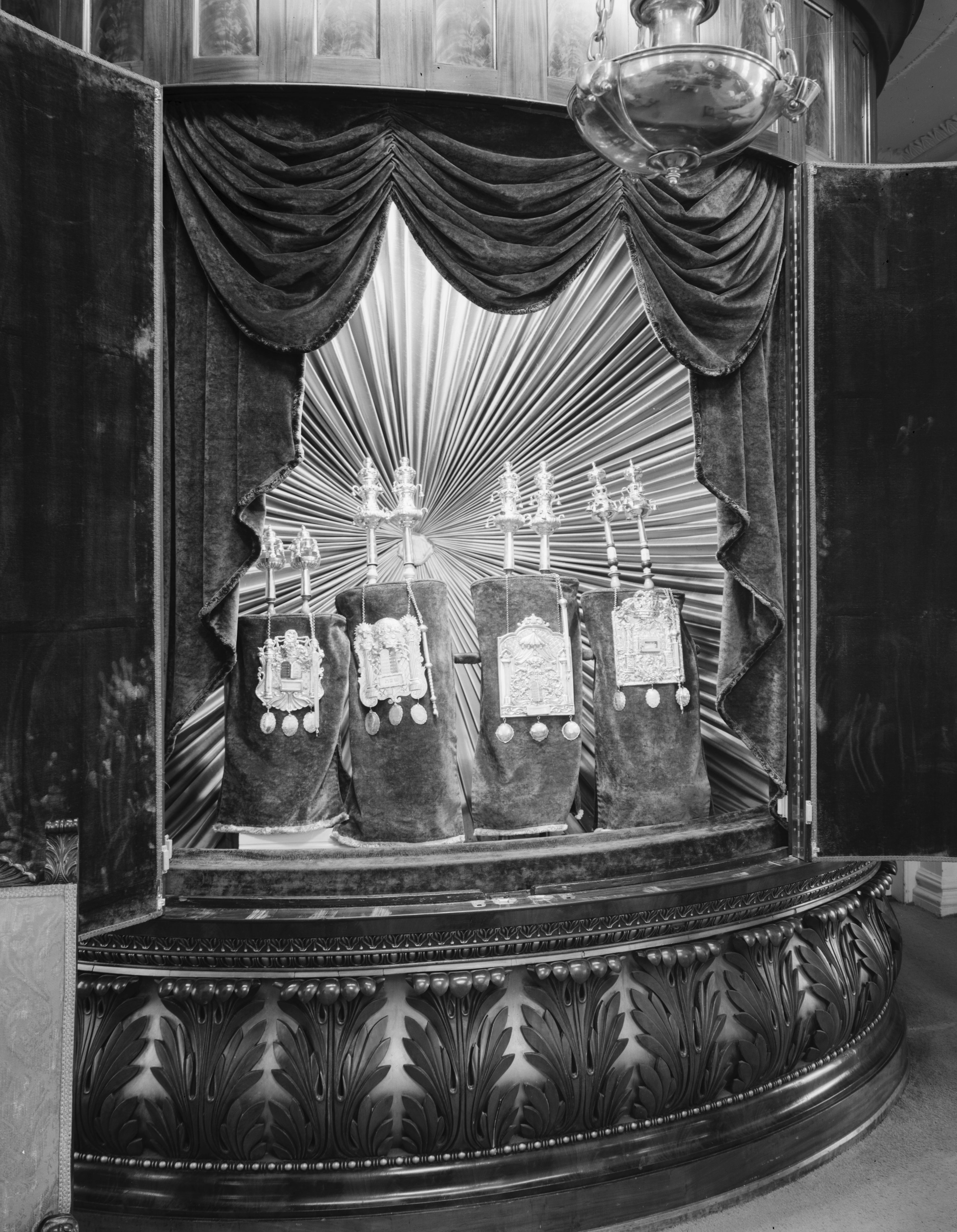 Kahal Kadosh Beth Elohim Synagogue